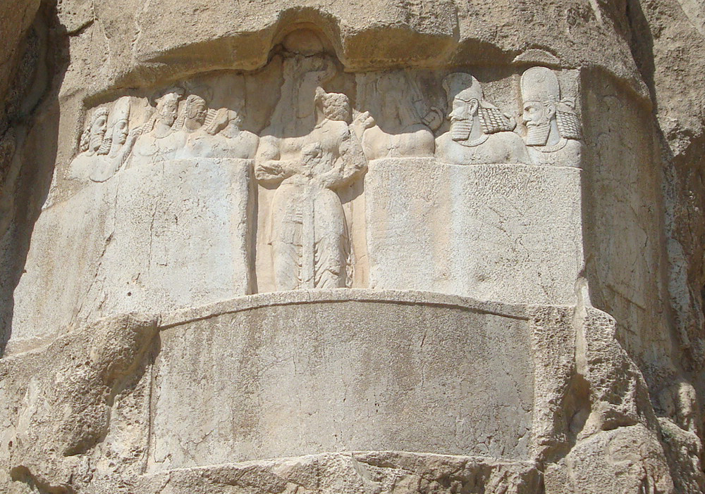 نقش رستم